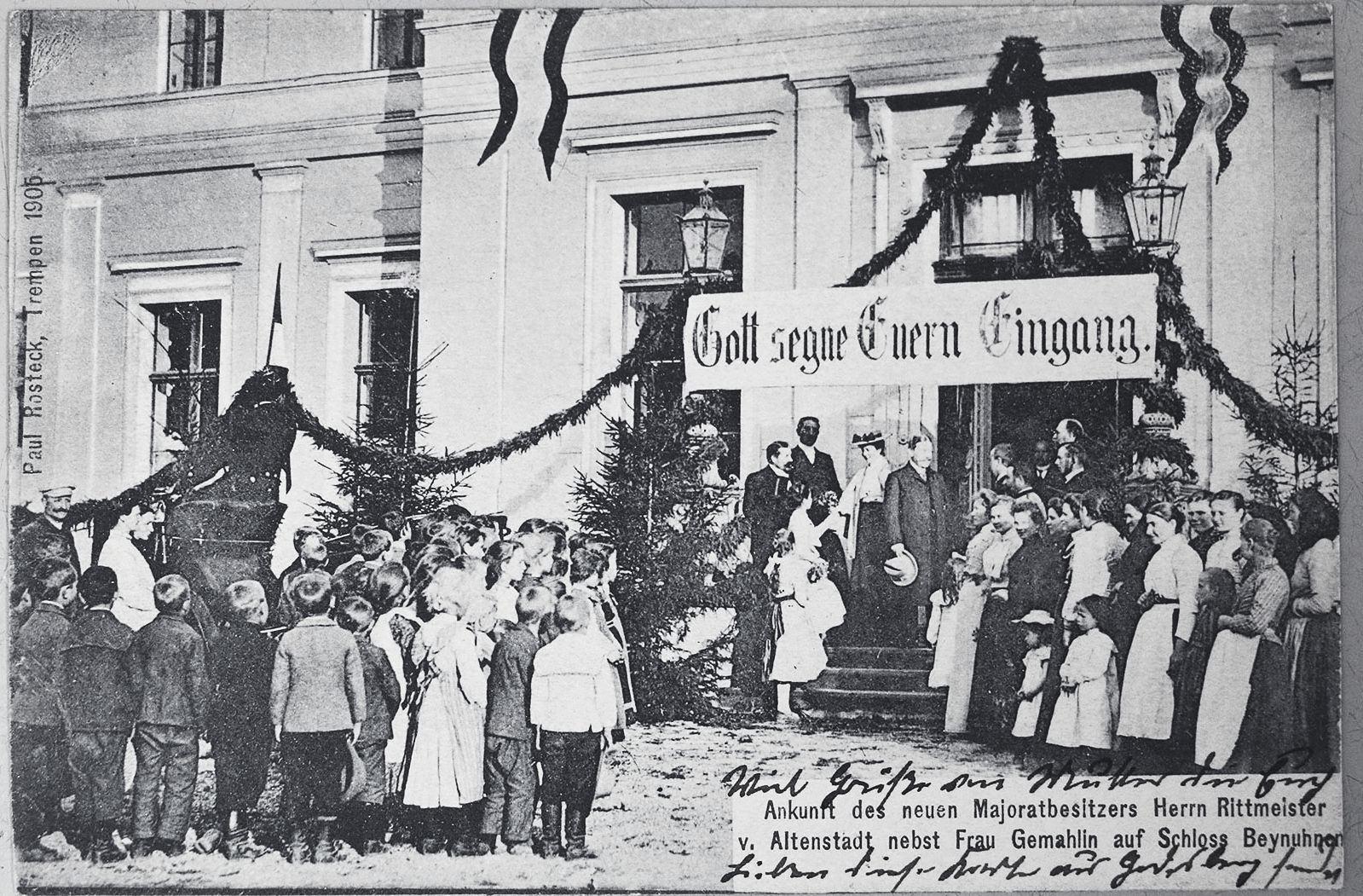 Дворец Кляйн Байнунен